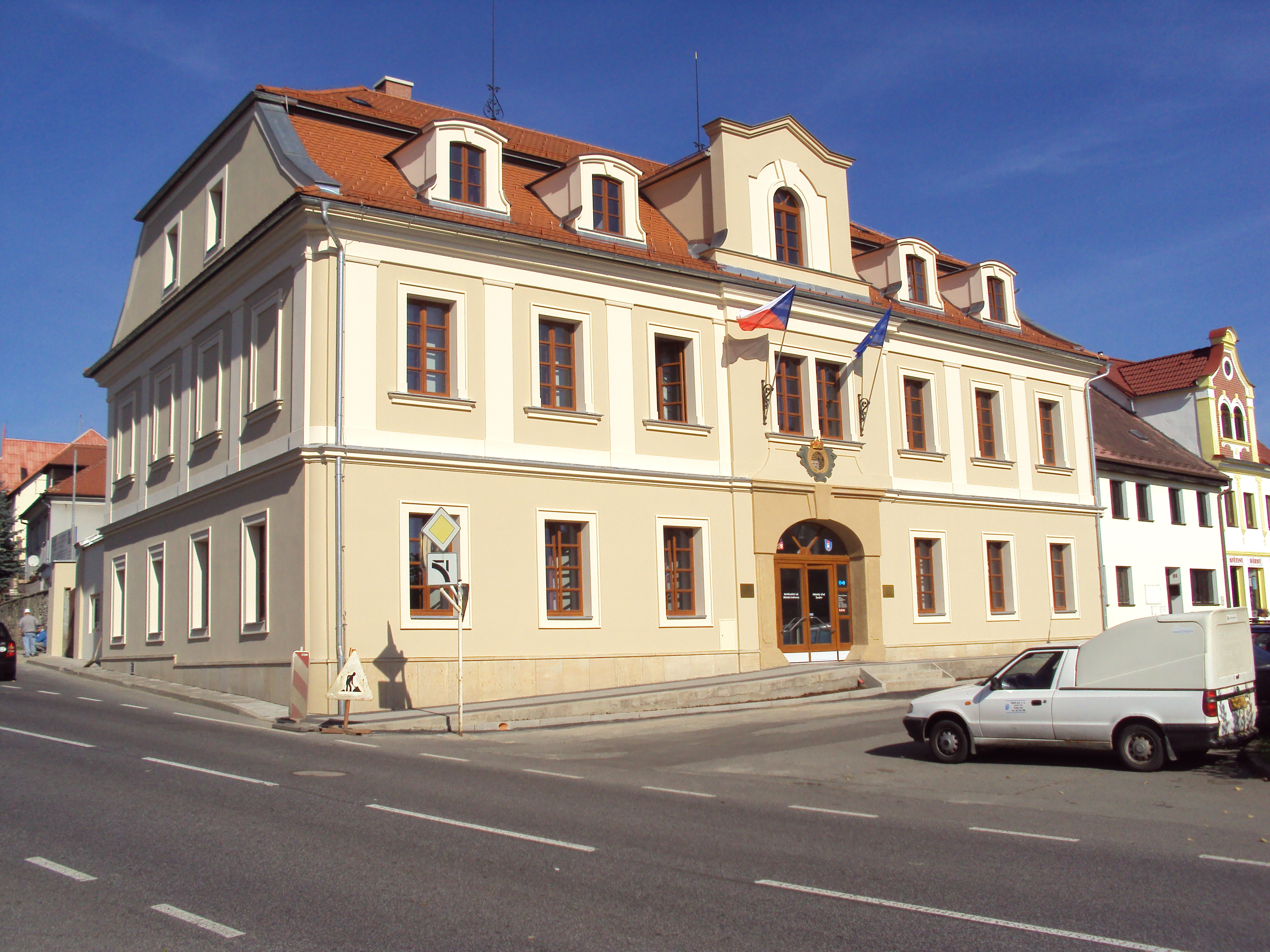 Budova na hlavním náměstí v Žandově